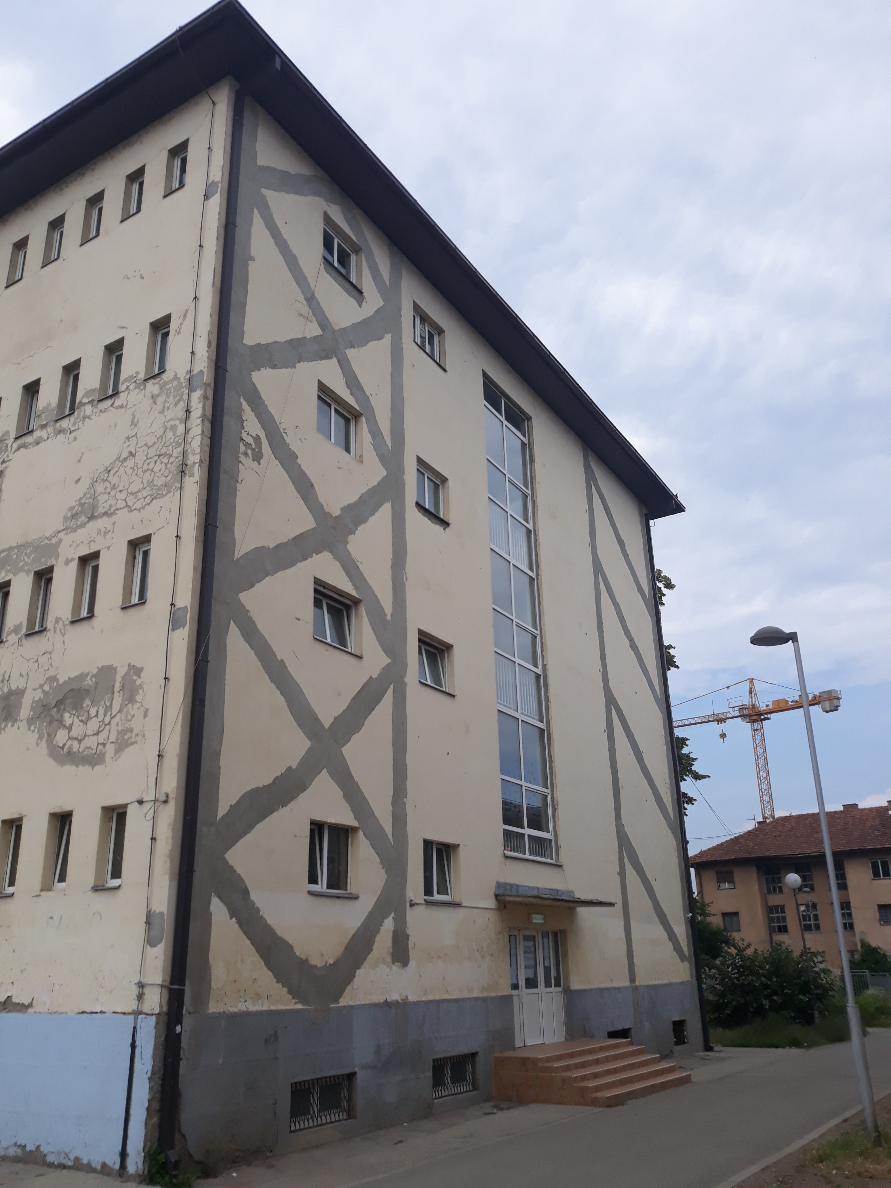 Зграда Гимназије у Краљеву